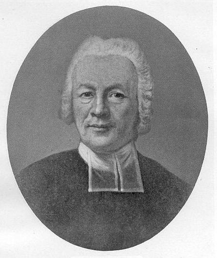 Johann August Ernesti (1707–1781), deutscher Altphilologe. Photographie eines Gemäldes von A. Graff im Besitze der Thomasschule Leipzig (aus Kämmel, Leipz. Schulwesen)